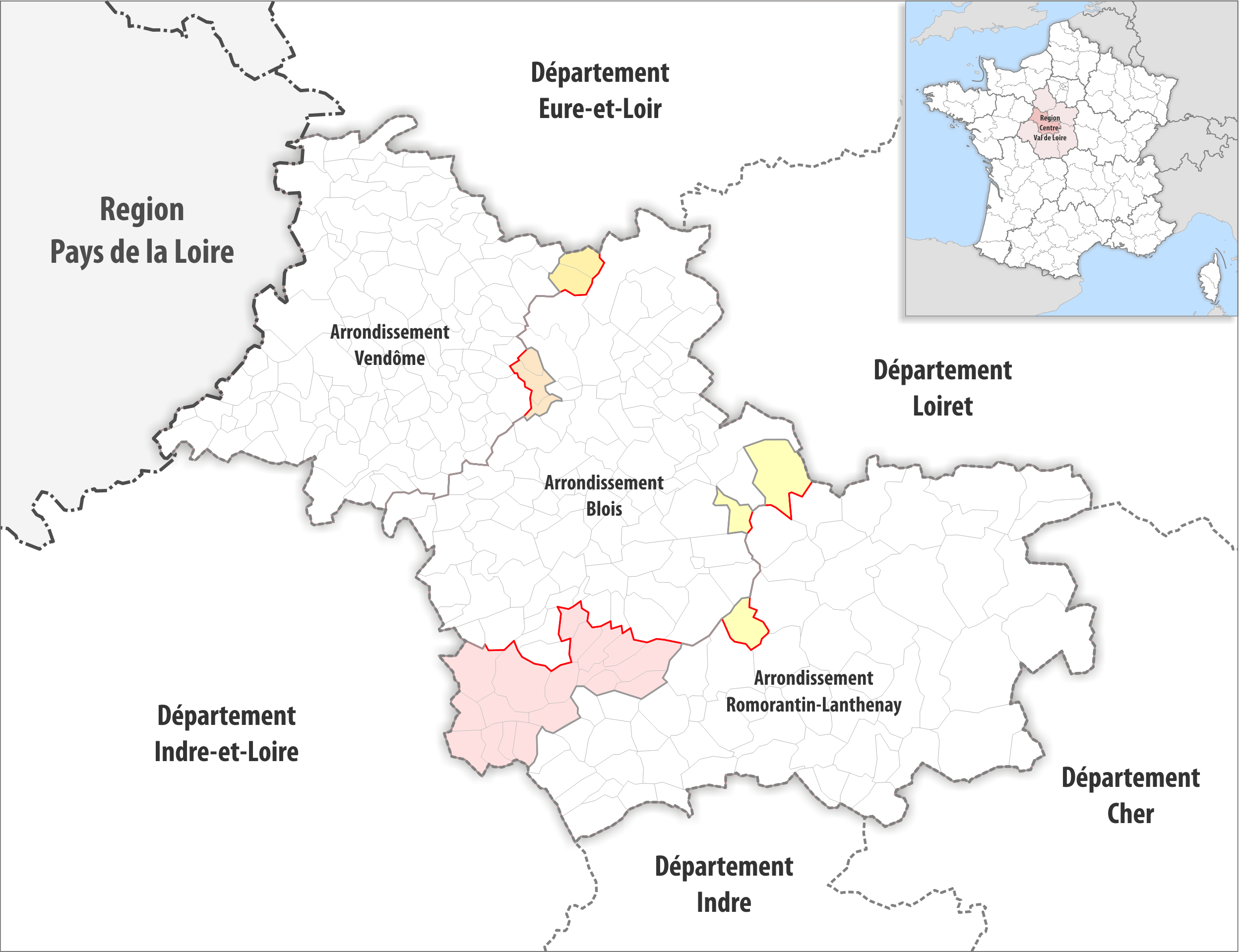 Arrondissements Anpassungen auf 2017 im Departement Loir-et-Cher